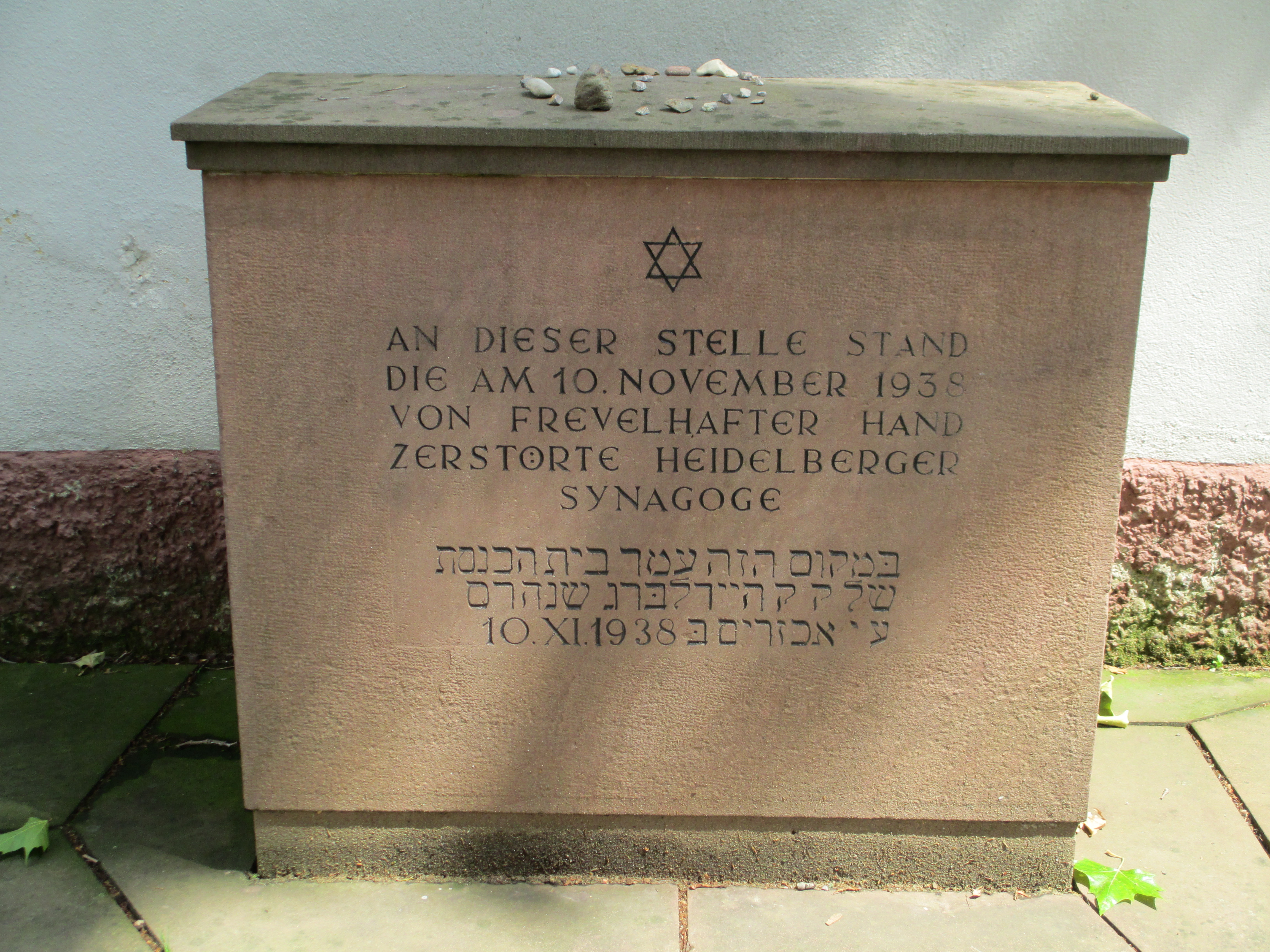 אתר זיכרון במקום בו עמד בית הכנסת של קהילת היידלברג שנהרס בליל הבדולח ב-1938